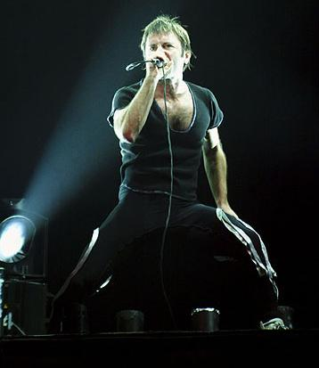 Bruce Dickinson, fotografiert am 21.09.1999 bei einem Konzert von Iron Maiden in Stuttgart, Hanns-Martin-Schleyer-Halle